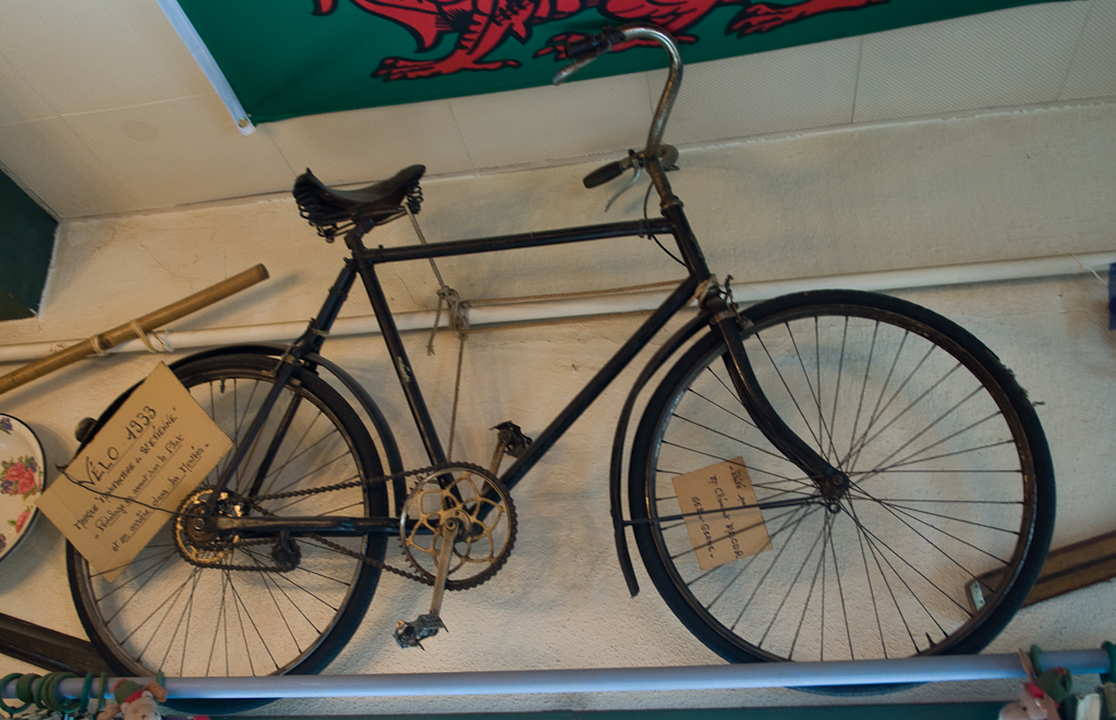 Fahrrad mit Retrodirect-Schaltung. Fotografiert auf dem Tourmalet.